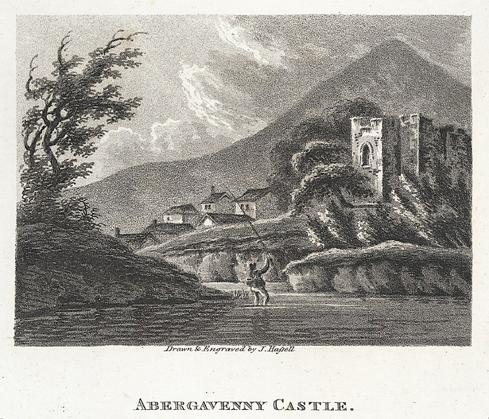 1 print : aquatint, b&w ; image size 77 x 105 mm., paper size 158 x 244 mm.